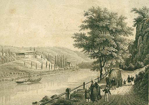 Abtei Neuburg von der Schlierbacher Landstraße aus gesehen